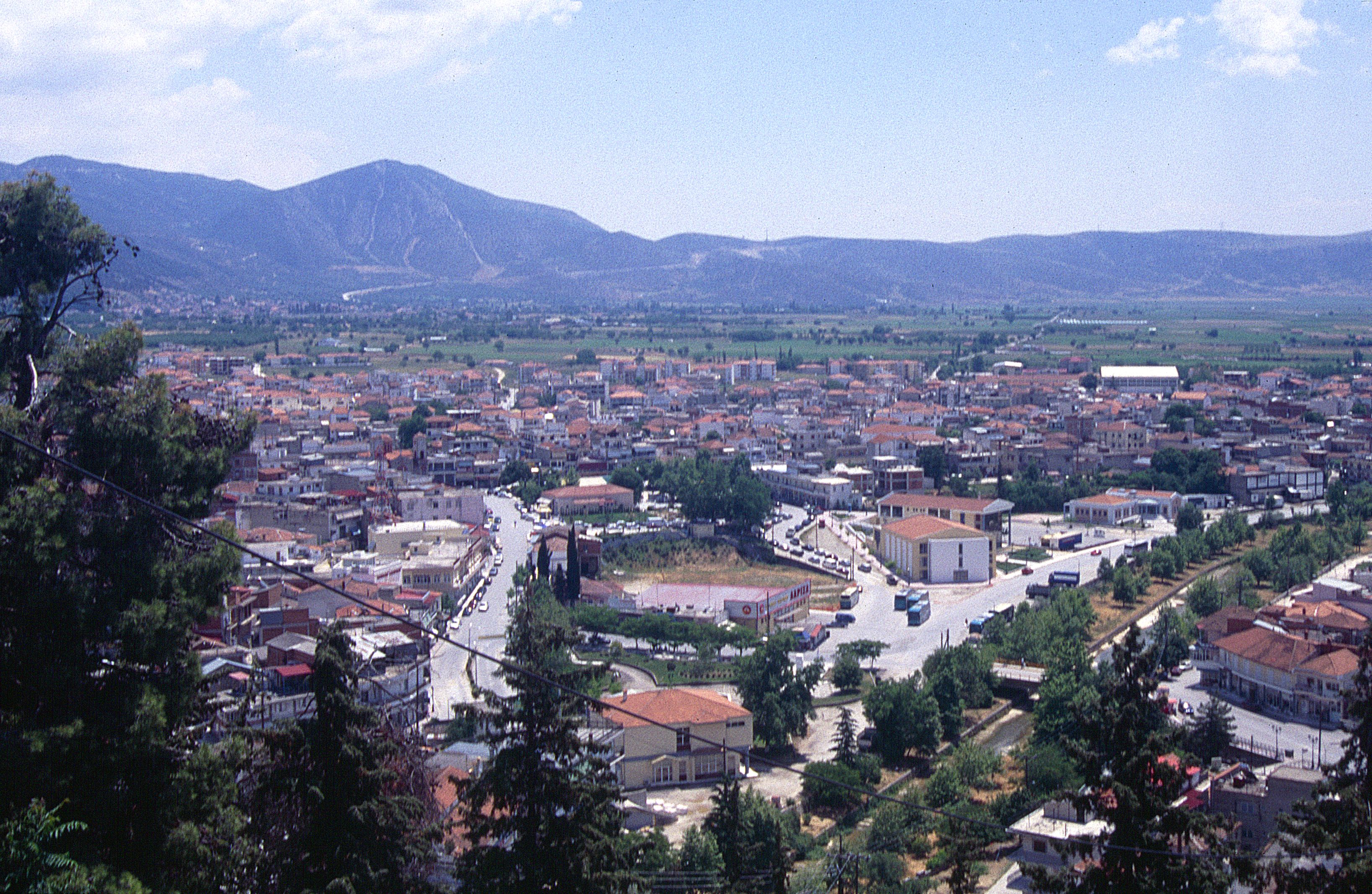 Elassona